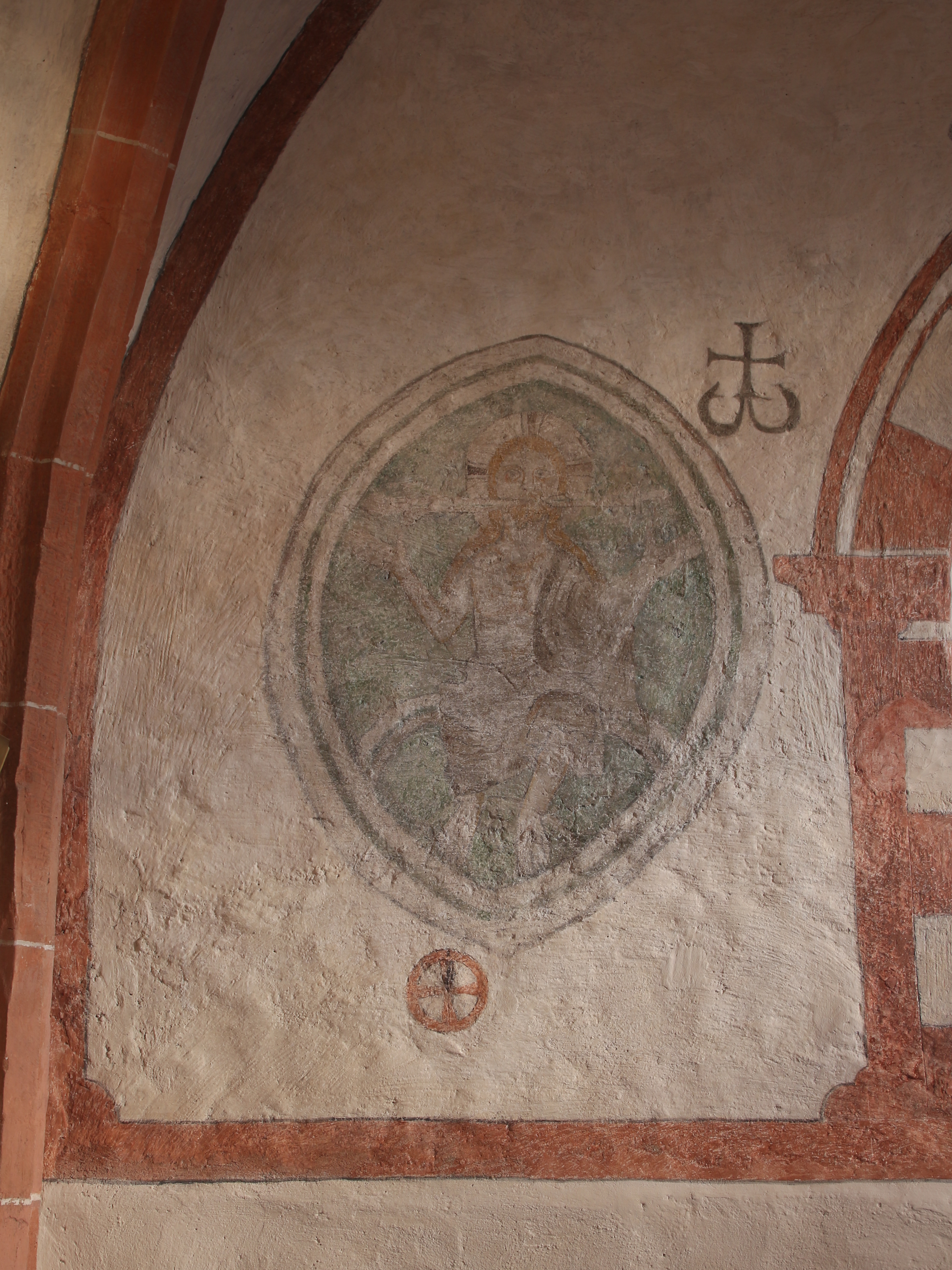 Evangelische Kirche Sterzhausen, Gemeinde Lahntal, Landkreis Marburg-Biedenkopf, Hessen